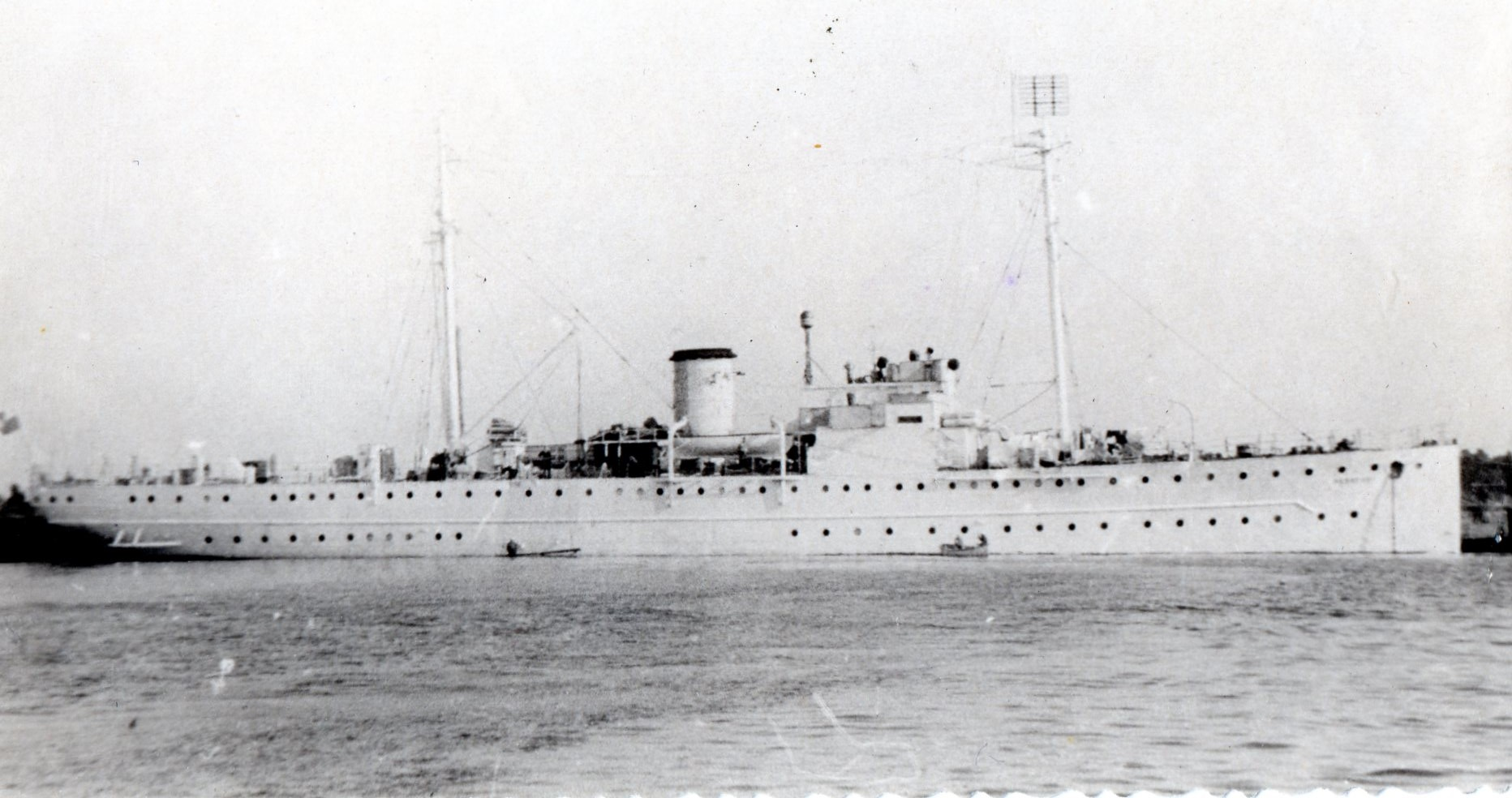 Опытовое судно "Экватор" в 1949 году